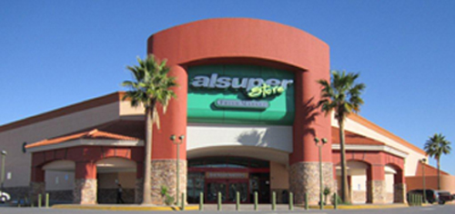 Alsuper Santa Fe